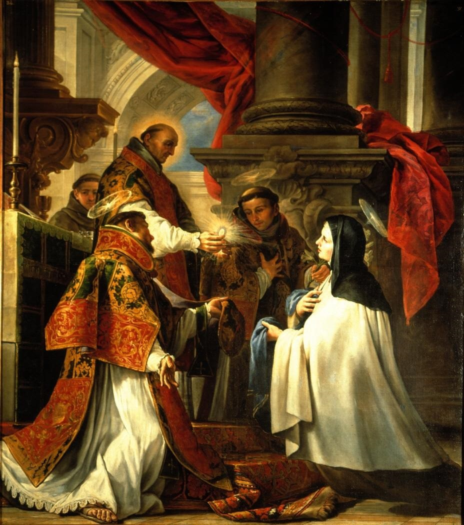 El lienzo muestra a Santa Teresa de Jesús (1515-1582), recibiendo la sagrada comnión de manos de un sacerdote.